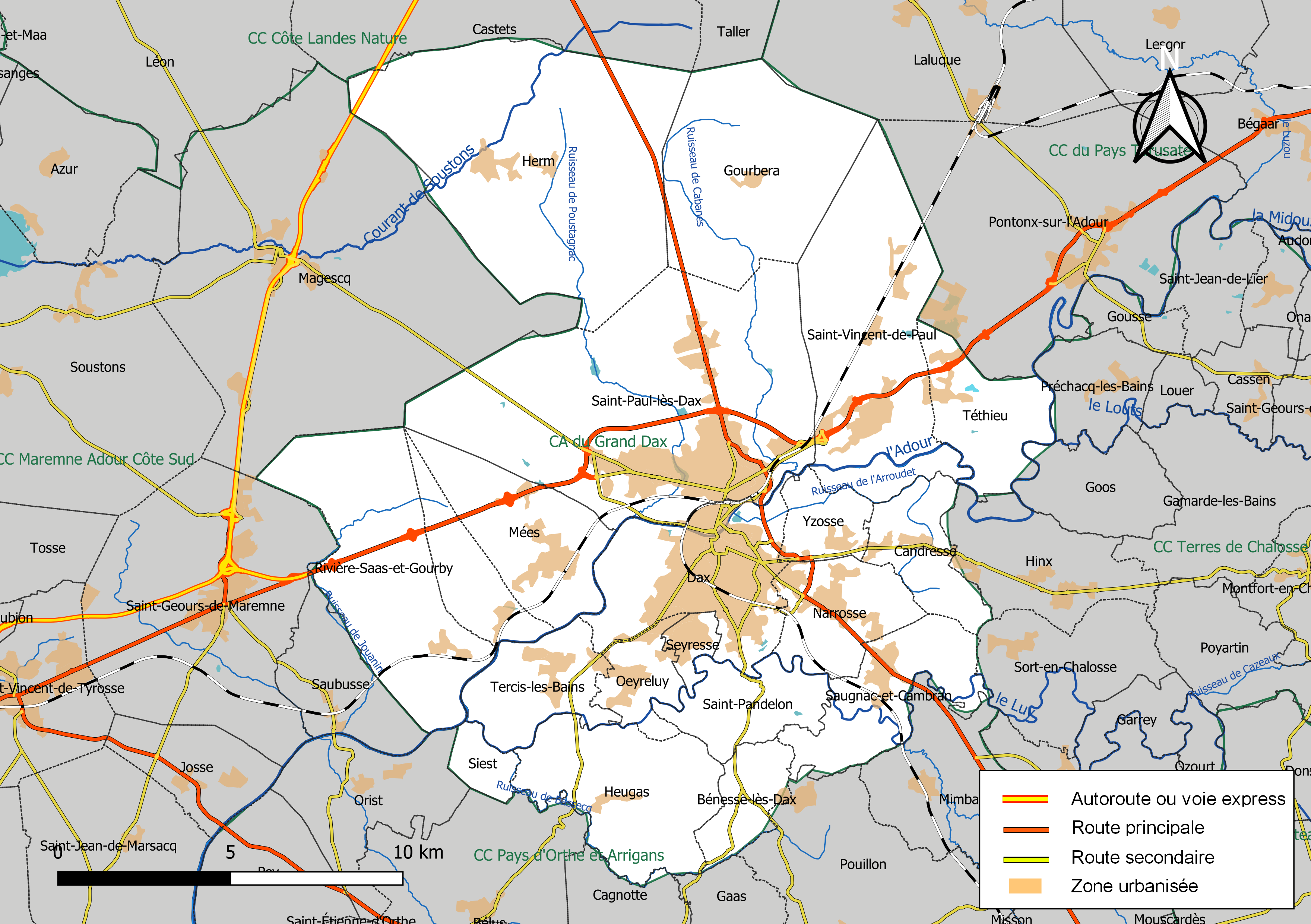 Carte géographique de la Communauté d'agglomération du Grand Dax, département des Landes, France. Composition au 1er janvier 2019.